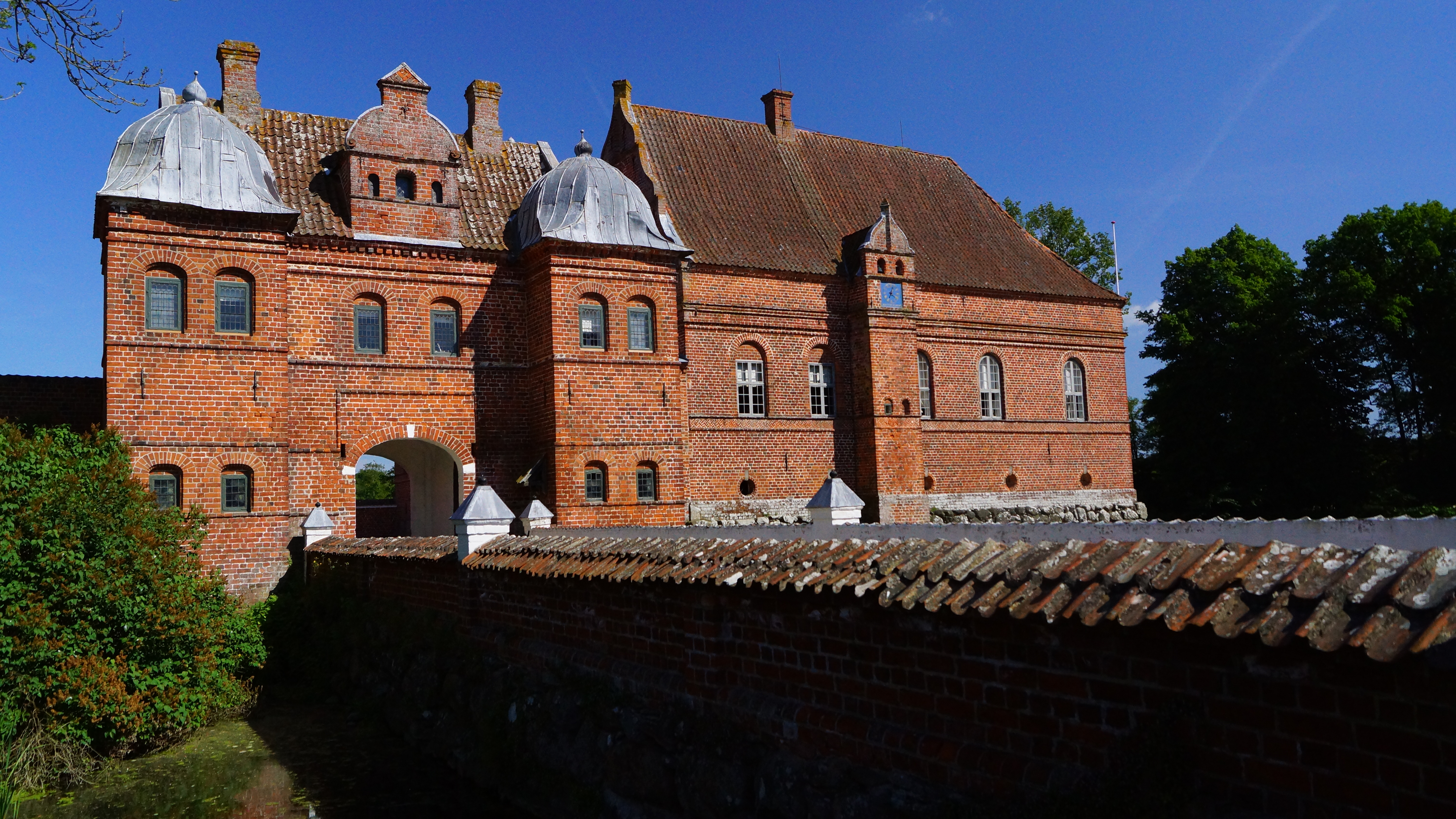 Skafføgård, Djursland 1